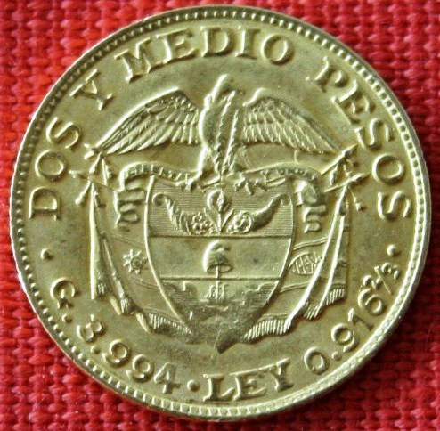 1919 2,5 Pesos Columbien Simón Bolivar